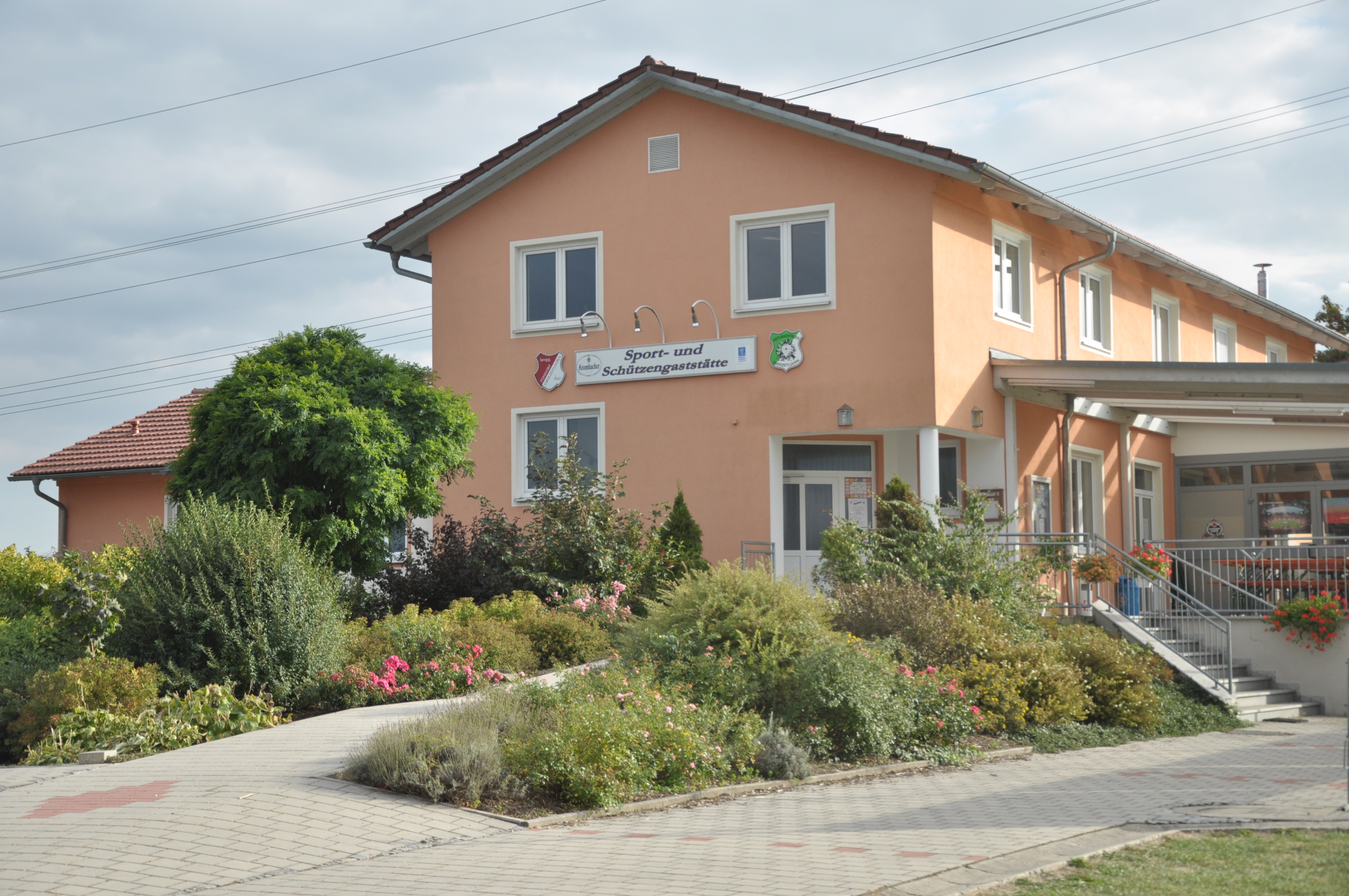 Erbaut in Eigenleistung der Mitgieder im Jahr 2002